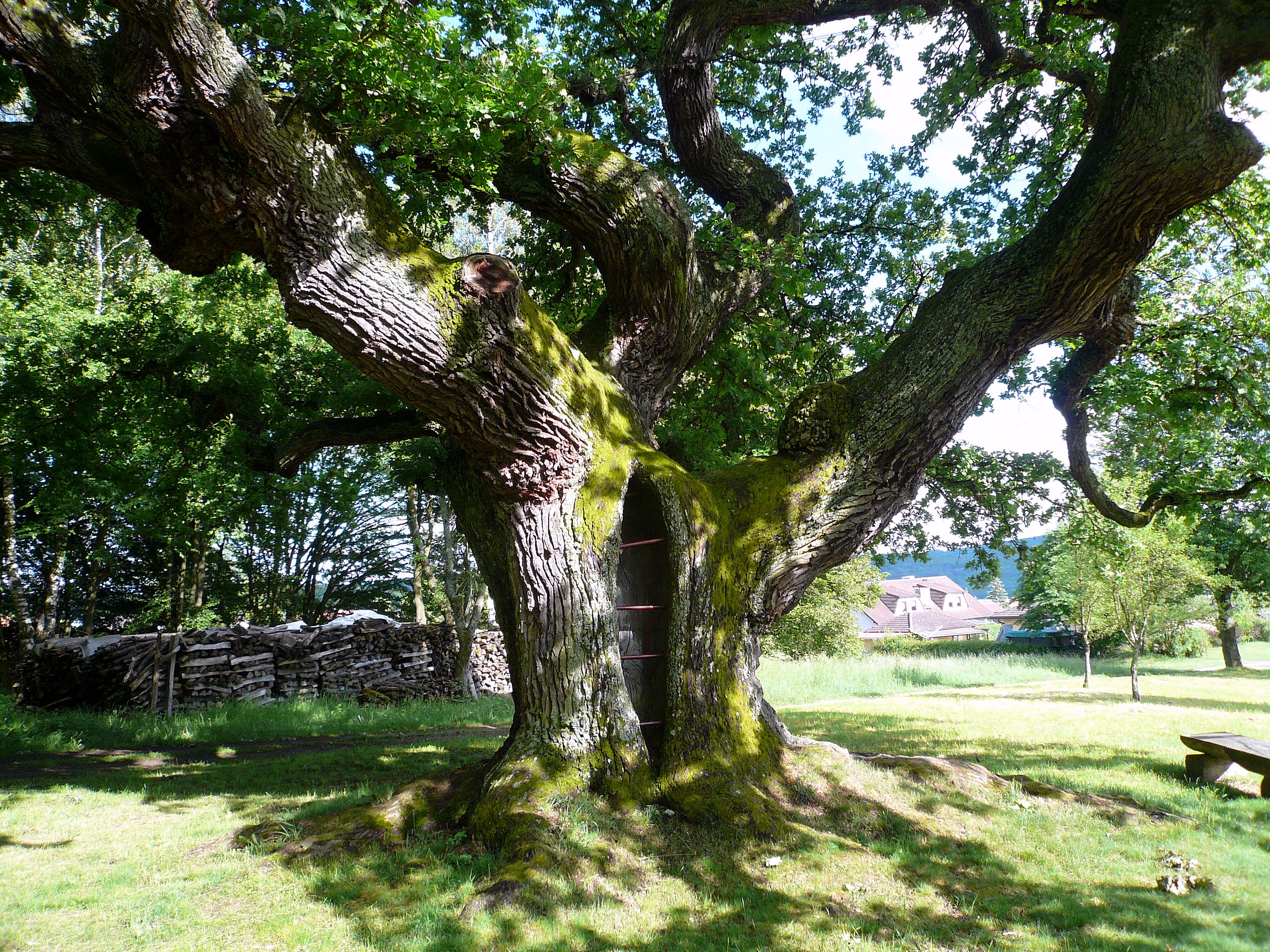 Eiche bei Reith